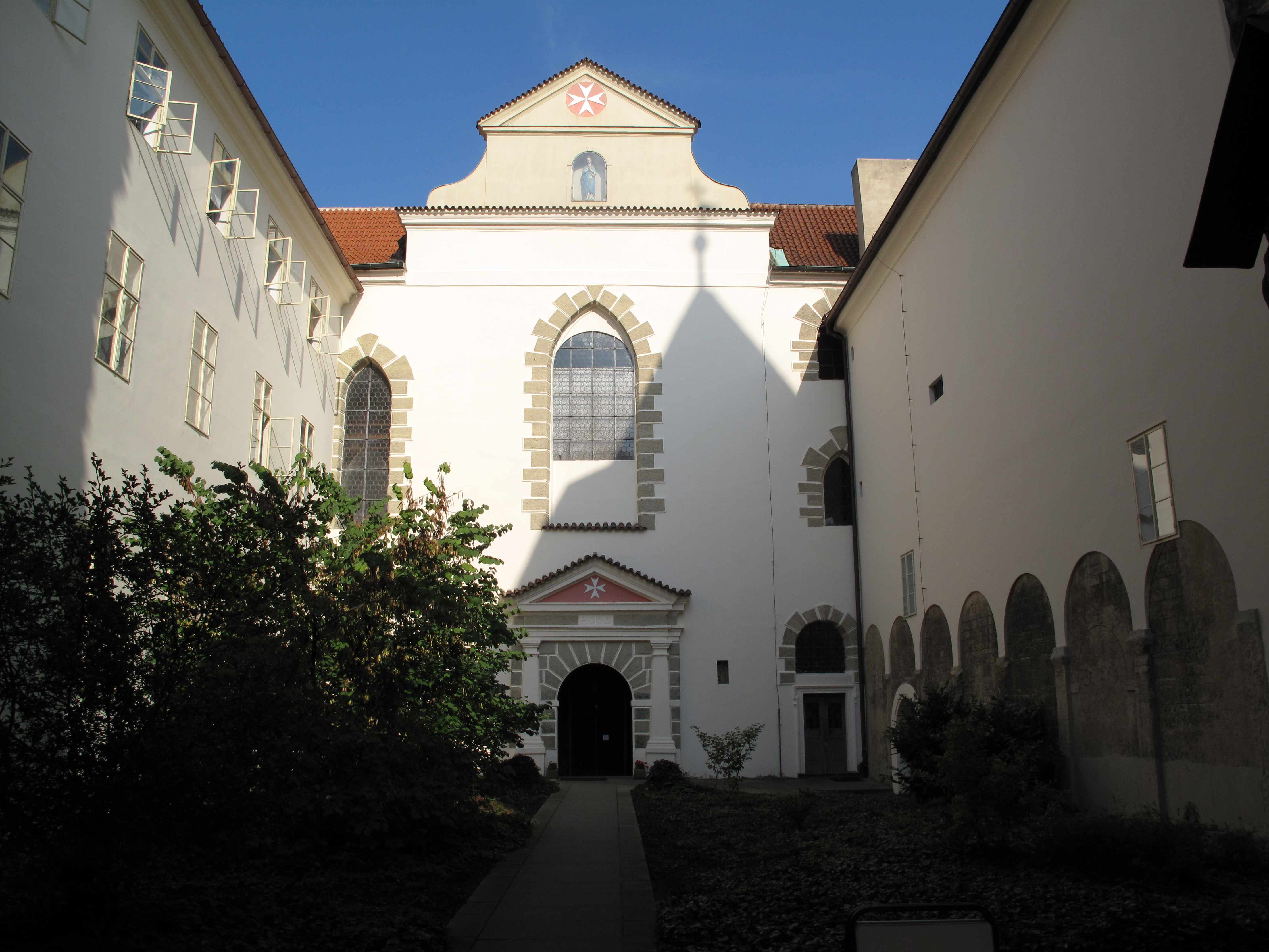 Česky: Malá Strana